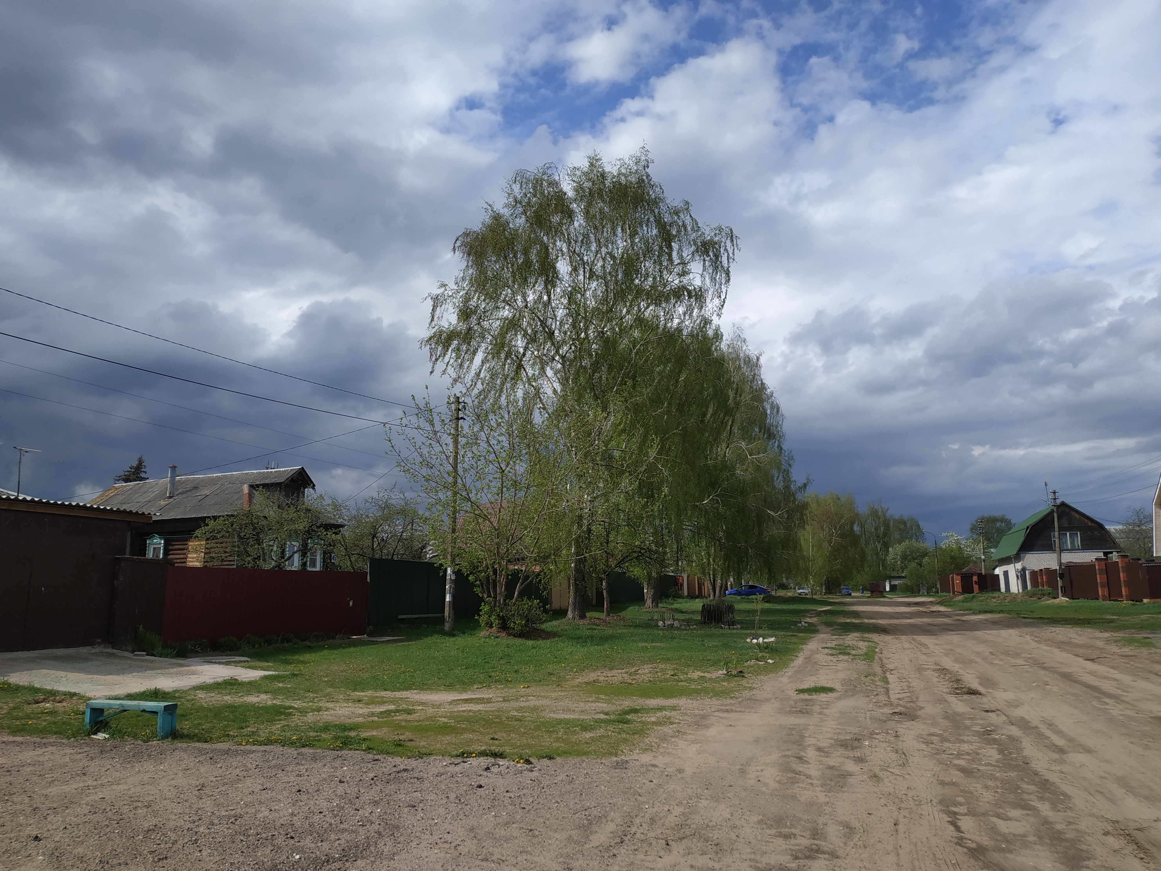 Деревня Клишева, Раменский округ